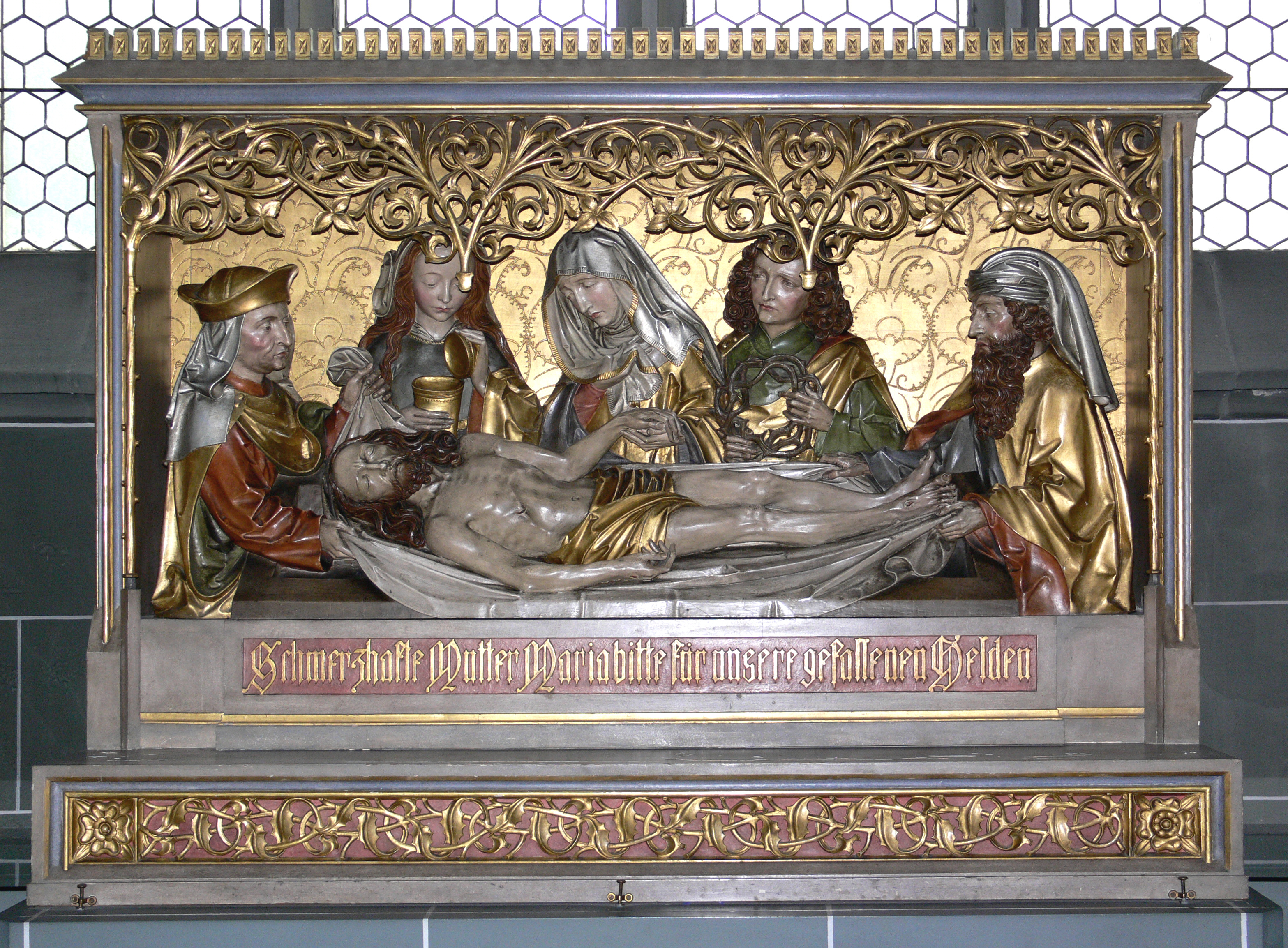 Katholische Pfarrkirche St. Georg, Ulm (Donau), ehemalige katholische Garnisonskirche Heiliggrabaltar von Prof. Theodor Schnell d. J. (Ravensburg), 1919, unter Verwendung einer Figurengruppe der Grablegung von Joseph Dettlinger (Freiburg i. Br.)